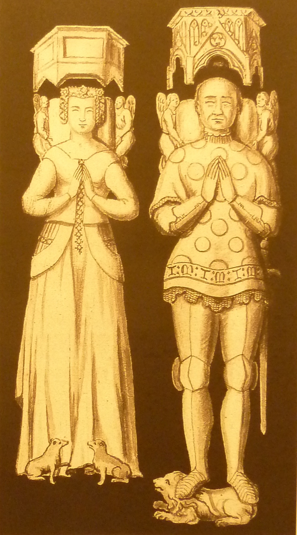 Gisant en marbre de Jean II de Malestroit (décédé en 1415) et de son épouse (dessin de Dom Morice dans "Mémoires pour servir de preuves à l'histoire ecclésiastique et civile de la Bretagne", Pris, 1742-1746)